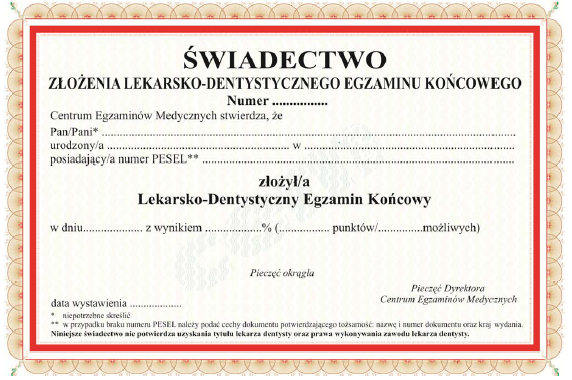 L-DEK